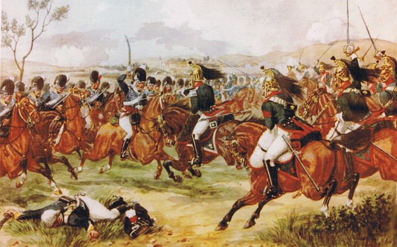 Charge du 20e dragons légers britannique à la bataille de Vimeiro, le 21 août 1808. Les dragons parviennent dans un premier temps à sabrer efficacement l'infanterie française en retraite avant d'être contre-chargés et repoussés par la cavalerie française du général Margaron. Le colonel Taylor du 20e est tué au cours du combat.